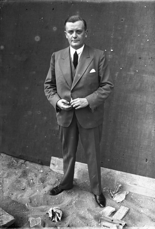 Eine Epoche machende Erfindung auf dem Gebiete des Tonfilms ! Dem in Berlin lebenden Erfinder Denés Mihaly ist es gelungen, einen Vorführ-Apparat für Tonfilme zu construieren, der in der Lage ist, Tonfilme aller Systeme wiederzugeben. Ausserdem wird keines der bestehenden Patentrechte durch Benutzung des neuen Apparates verletzt werden. Die Erfindung wird noch geheim gehalten.